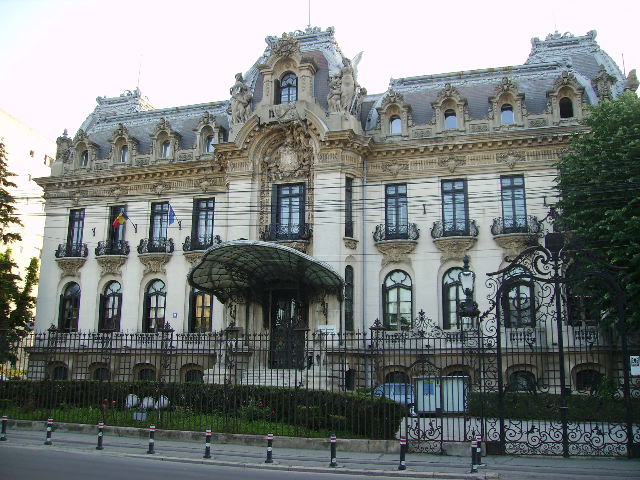 Palatul Cantacuzino, Calea Victoriei, Bucureşti